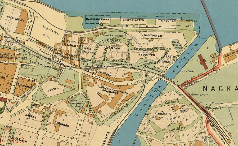 Del av Stockholmskartan visande kvarteret Sommaren med omgivning